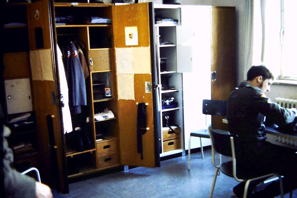 Unsere Stube.